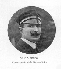 Der spanische Automobilbauer, Radrennfahrer und Automobilrennfahrer Francisco Serramalera Abadal (1875-1939)